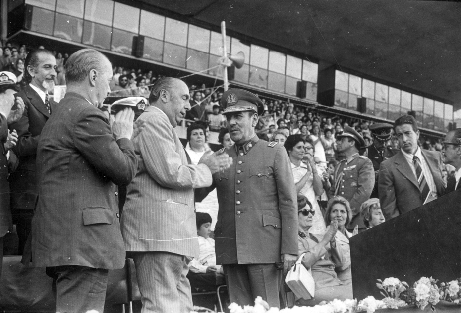 06/12/1972. Pablo Neruda durante la ceremonia de reconocimiento público que se realizó en el estadio nacional, luego de volver al país procedente de europa. Aparece junto al General Carlos Prats vice presidente de Chile y, otras autoridades civiles. Al fondo a la izquierda aparece el ministro de defensa Sr. José Toha.